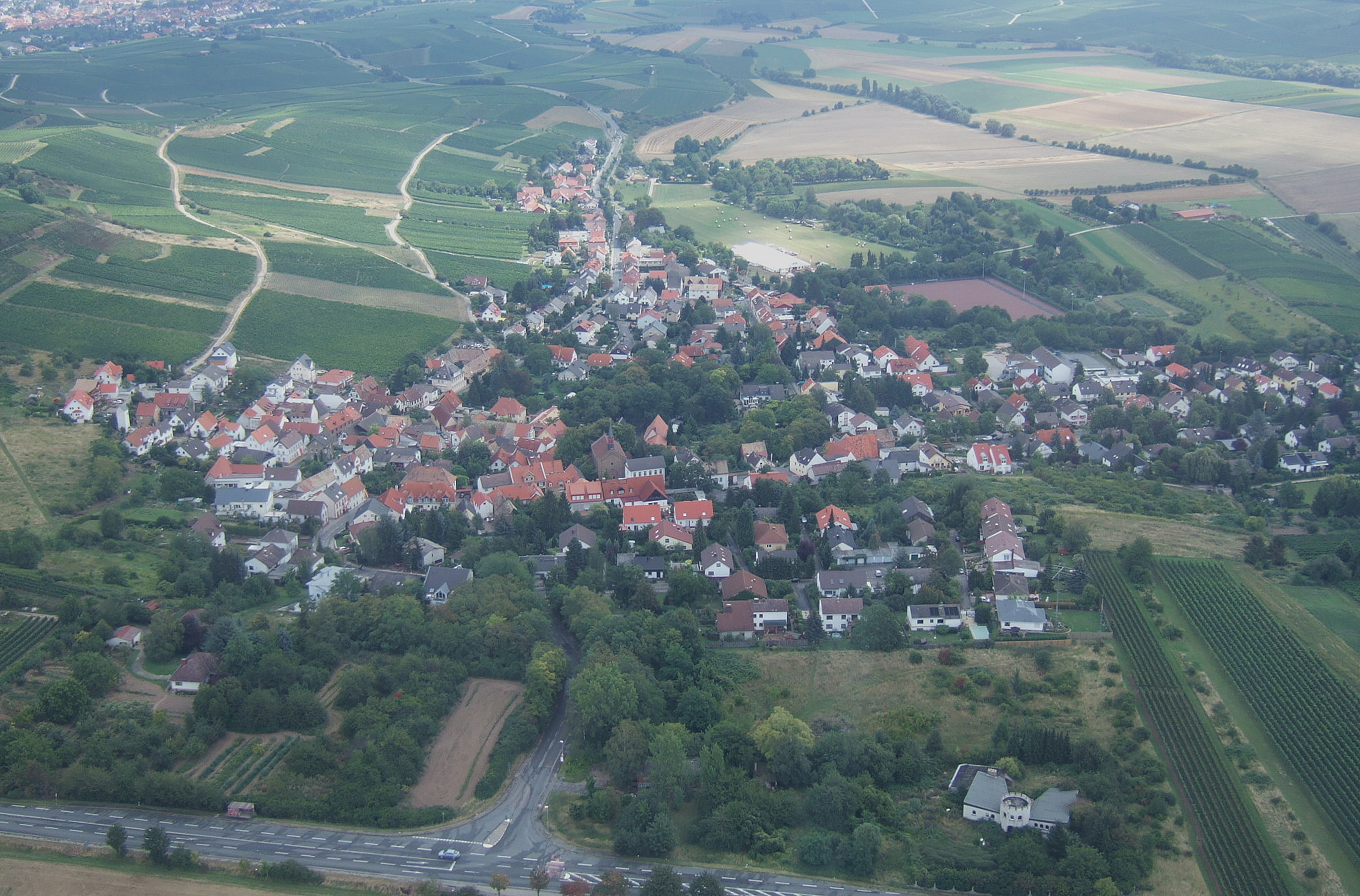 Luftaufnahme des Ortes Gau-Bischofsheim im August 2006